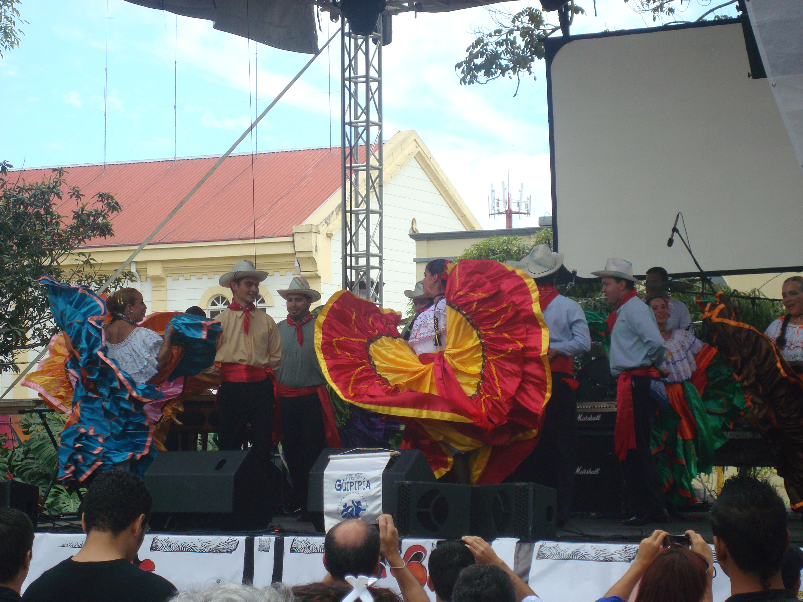 Baile típico costarricense durante la celebración del Transitarte en el Parque Nacional, San José de Costa Rica.